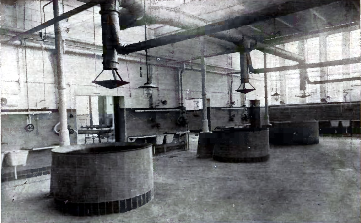 Kaldaunenwäsche